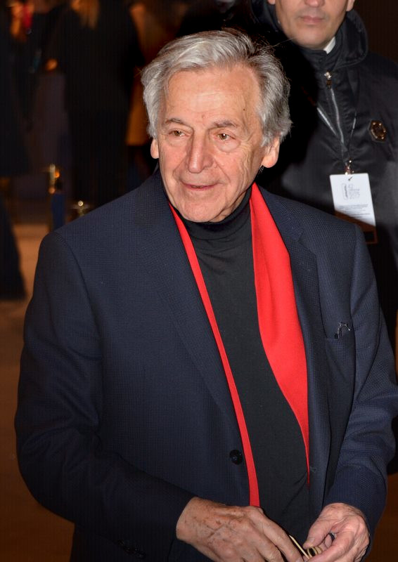 Costa-Gavras à la cérémonie des César